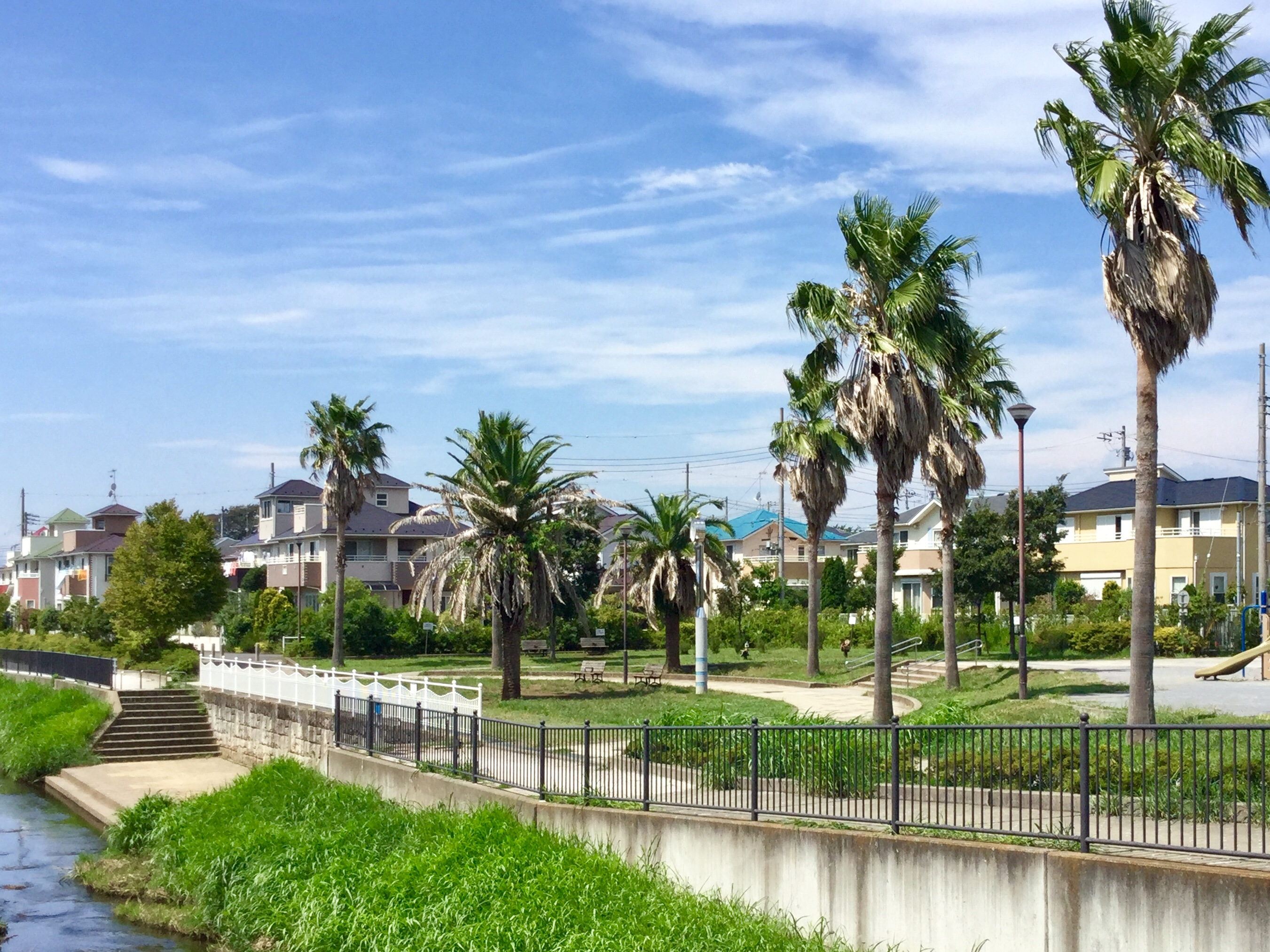 神奈川県茅ヶ崎市みずき地区